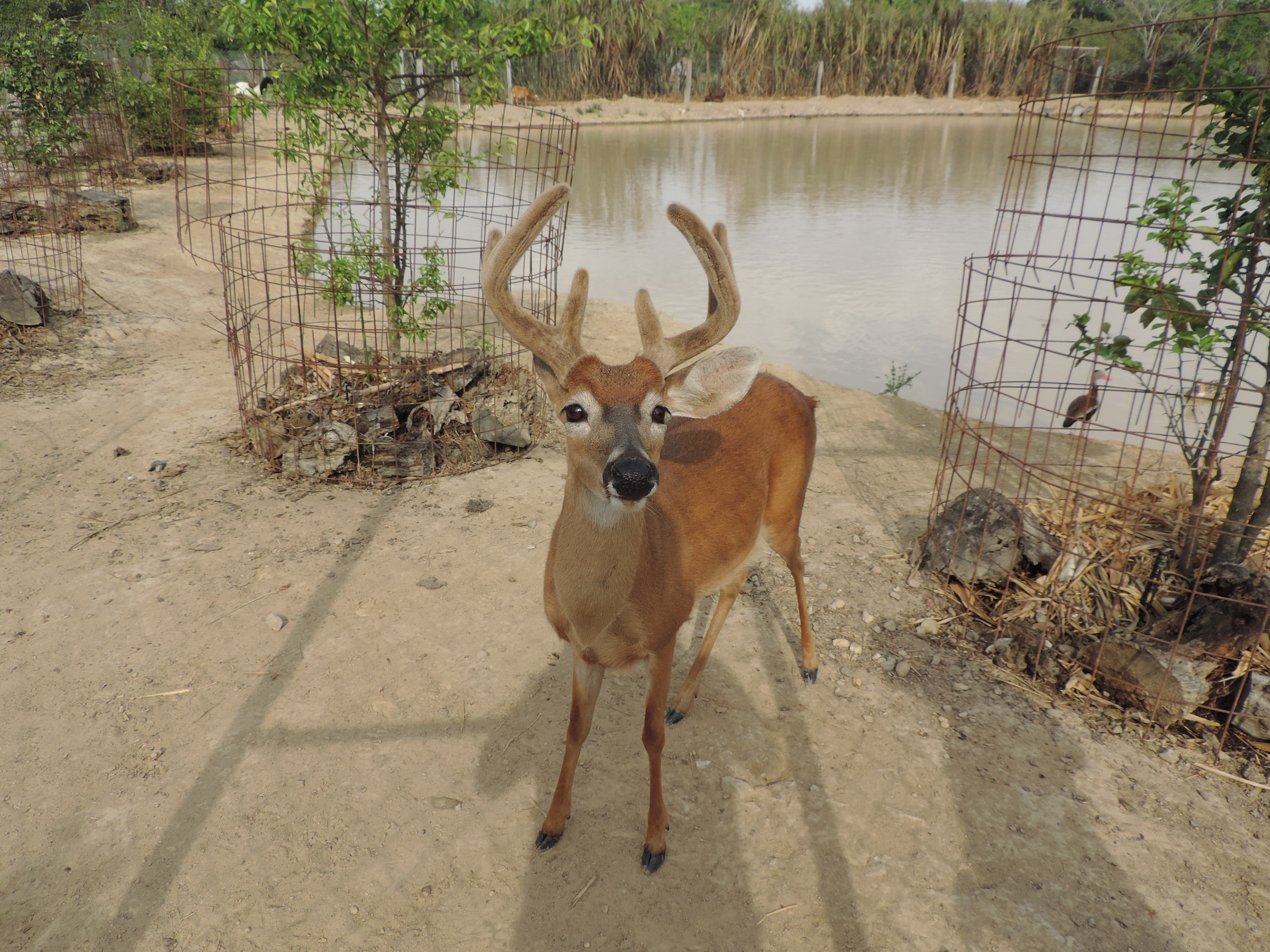 Este hermoso venado se encuentra en una finca ubicado en Guasdualito edo Apure Venezuela, debemos decir que las apariencias engañan este venado parece que fuese de plástico pero no lo es, lo pude ver y tocar gracias a los propietarios de esa finca que con mucho esfuerzo y dedicación cuidan y protegen animales en peligro de extinción, allí radica la buena voluntad de los Venezolanos. Recuerda no te dejes llevar por lo que ves sino dejate llevar por lo que eres por dentro 04266700108 juan cedeño Barinas Venezuela